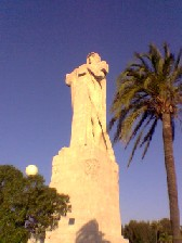 Image prise par moi même